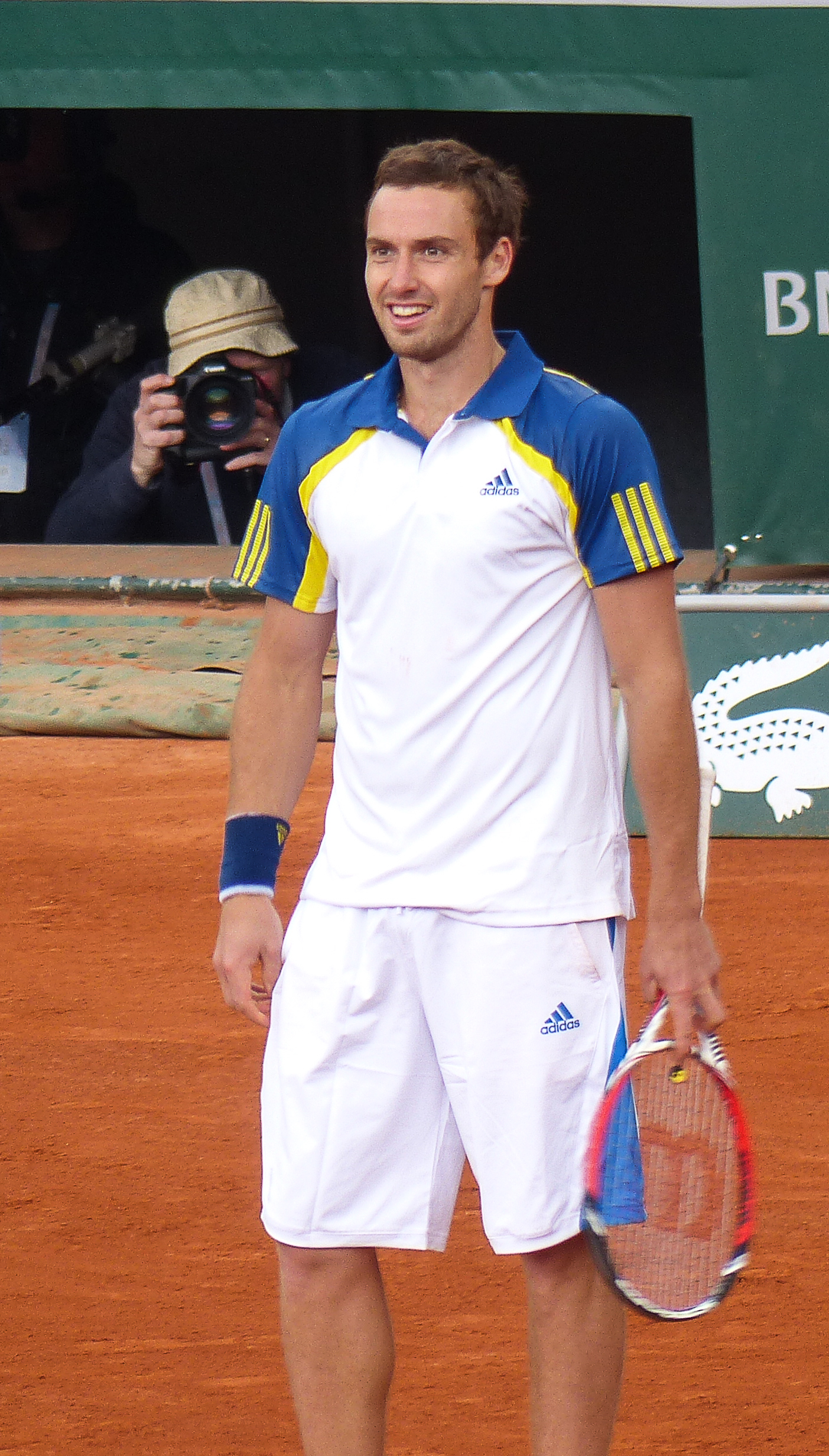 2ème tour Roland Garros 2013 : Gael Monfils (FRA) def. Ernests Gulbis (LAT)